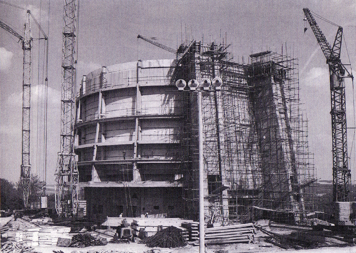 „Завършен е грубият строеж. Даден е фронт за работа на художниците, юли 1977 г.“